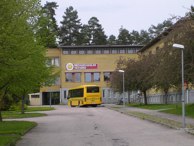 Infarten mot Musikhögskolan Ingesunds huvudentré.